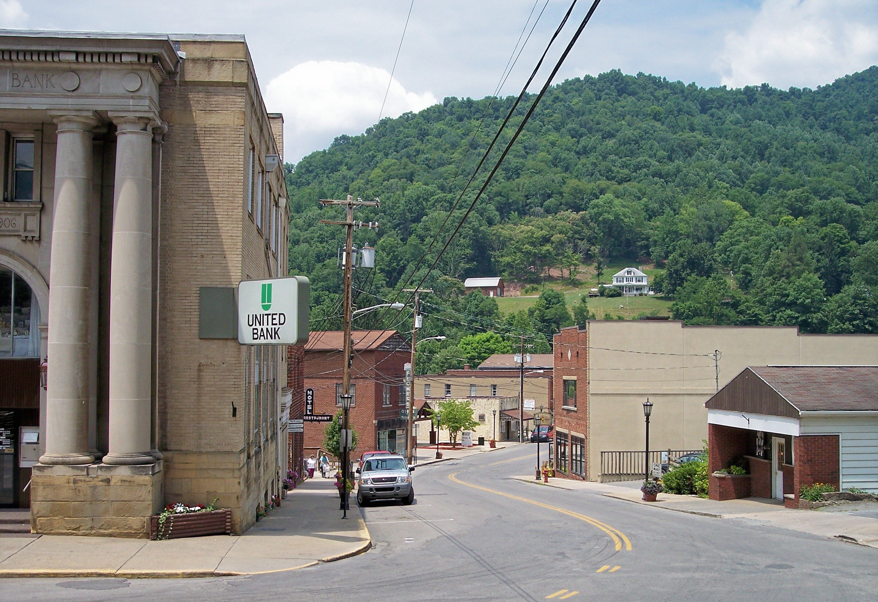 Main Street (West Virginia Route 15) in Webster Springs, West Virginia.